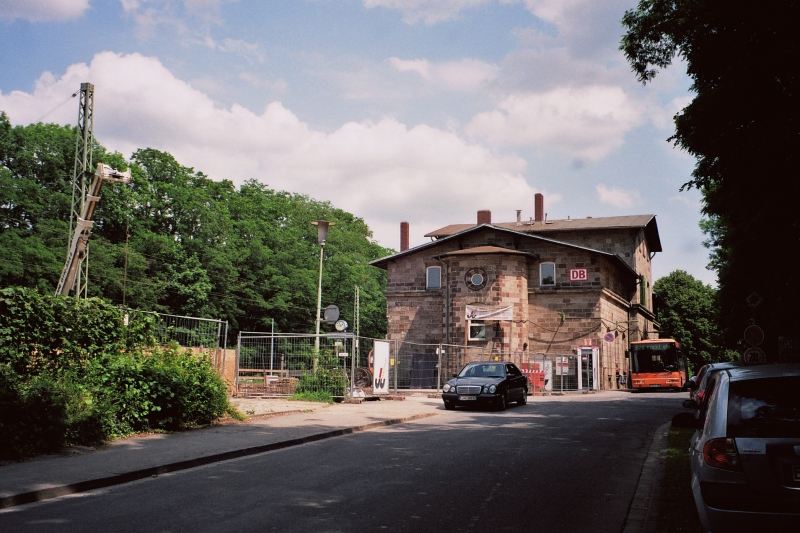 Bahnhof Witzenhausen Nord